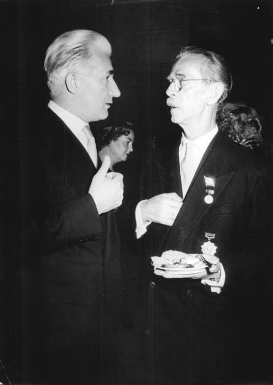 Berlin, 7. DDR-Jahrestag, Paul Wandel, Otto Nagel Zentralbild Krueger Zühlsdorf 8.10.1956 Staatsempfang zum 7. Jahrestag der DDR Am Abend des 7. Oktober gab der Ministerrat der DDR aus Anlass des 7. Jahrestages der Gründung der DDR im Haus der Ministerien zu Berlin einen Empfang. Vertreter des staatlichen und gesellschaftlichen Lebens, der Wirtschaft, Wissenschaft und Technik, der Kunst und Literatur, sowie die Nationalpreisträger 1956 und Träger des Vaterländischen Verdienstordens waren Gäste des Ministerrates. UBz: Der Sekretär des ZK der SED und Mitglied des Politbüros, Paul Wandel, im Gespräch mit dem Präsidenten der Deutschen Akademie der Künste zu Berlin, Prof. Otto Nagel, links: Paul Wandel, rechts: Prof. Otto Nagel. Abgebildete Personen: Nagel, Otto Prof.: Maler, Präsident der Akademie der Künste (AdK), Nationalpreisträger, Vaterländischer Verdienstorden (VVO) in Gold, DDR (PND 118586300) Wandel, Paul Dr.: Minister für Volksbildung, stellvertretender Minister für Auswärtige Angelegenheiten, Präsident der Liga für Völkerfreundschaft, SED, DDR